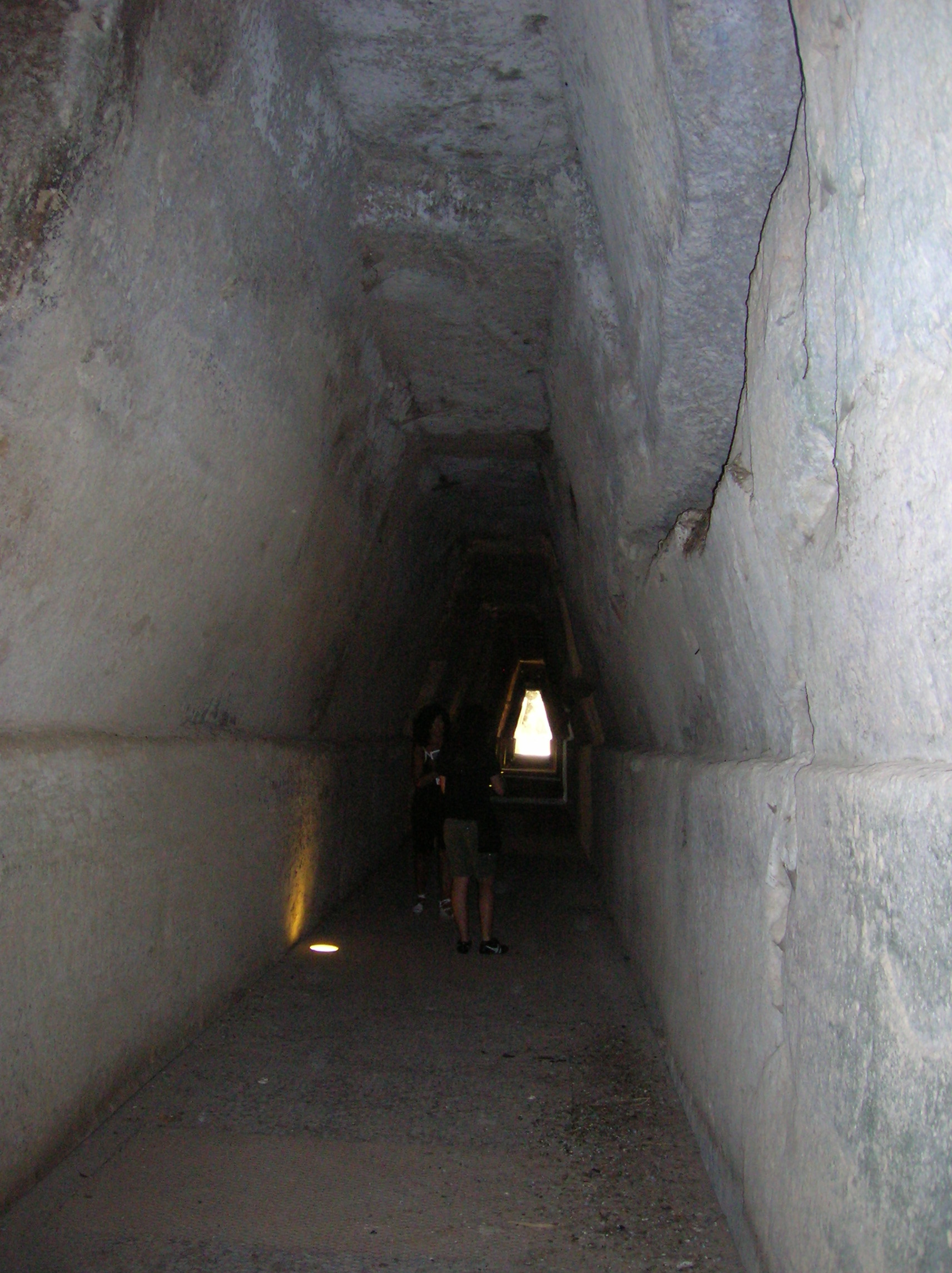 Inerior cueva de la Sibila